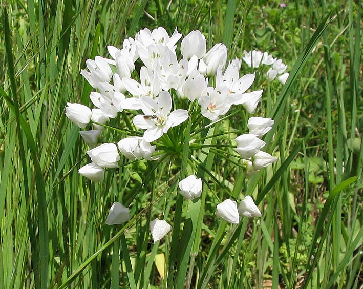 Allium neapolitanum Cirillo (ail blanc). Photo prise à Saint-Michel-de-Llotes en avril 2004